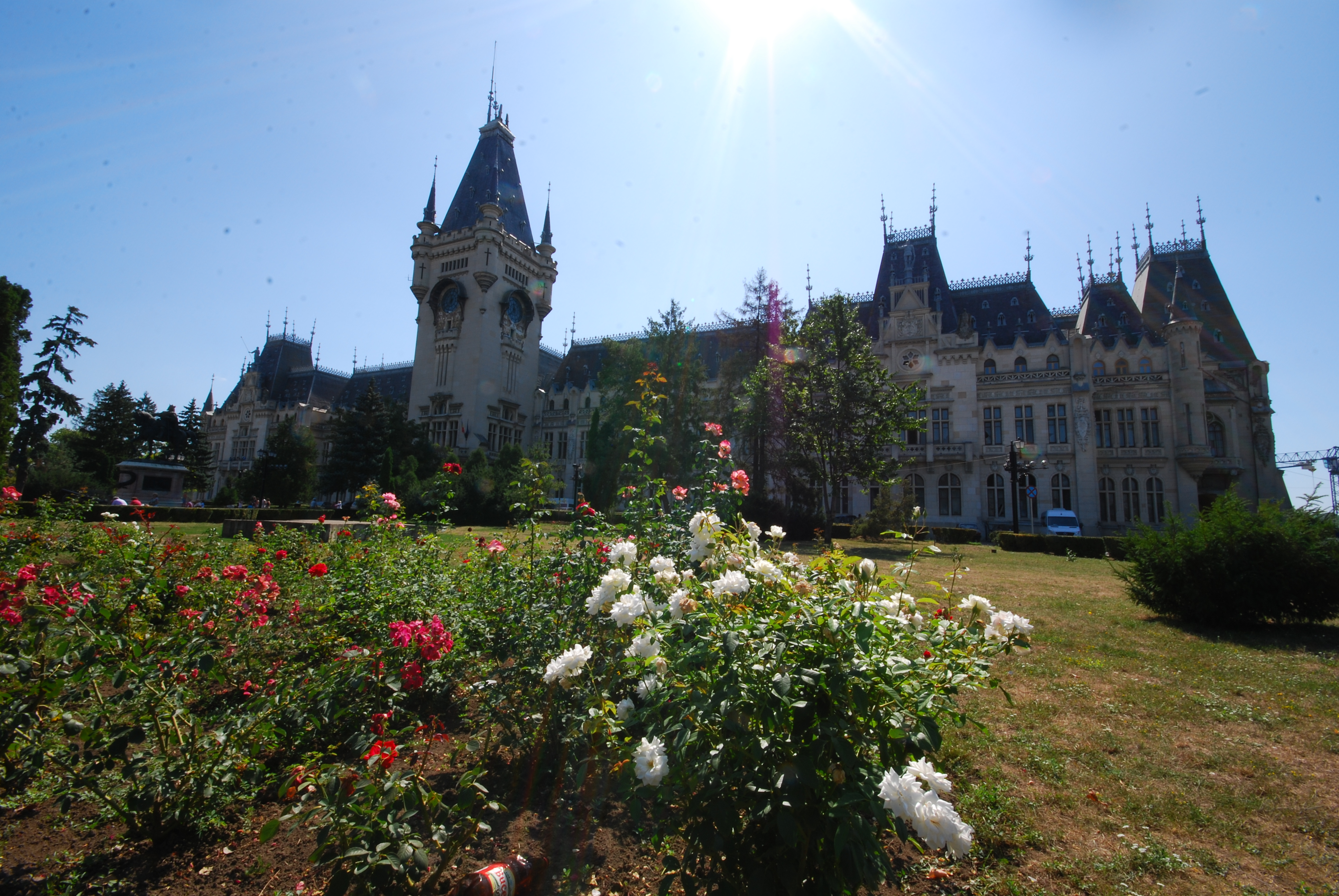 Palatul Culturii 01